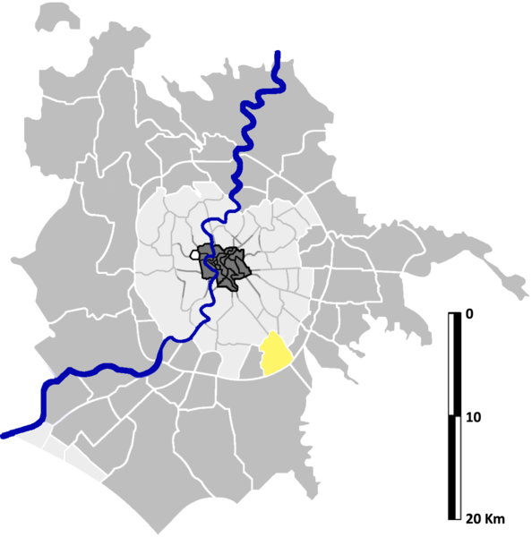 Torricola